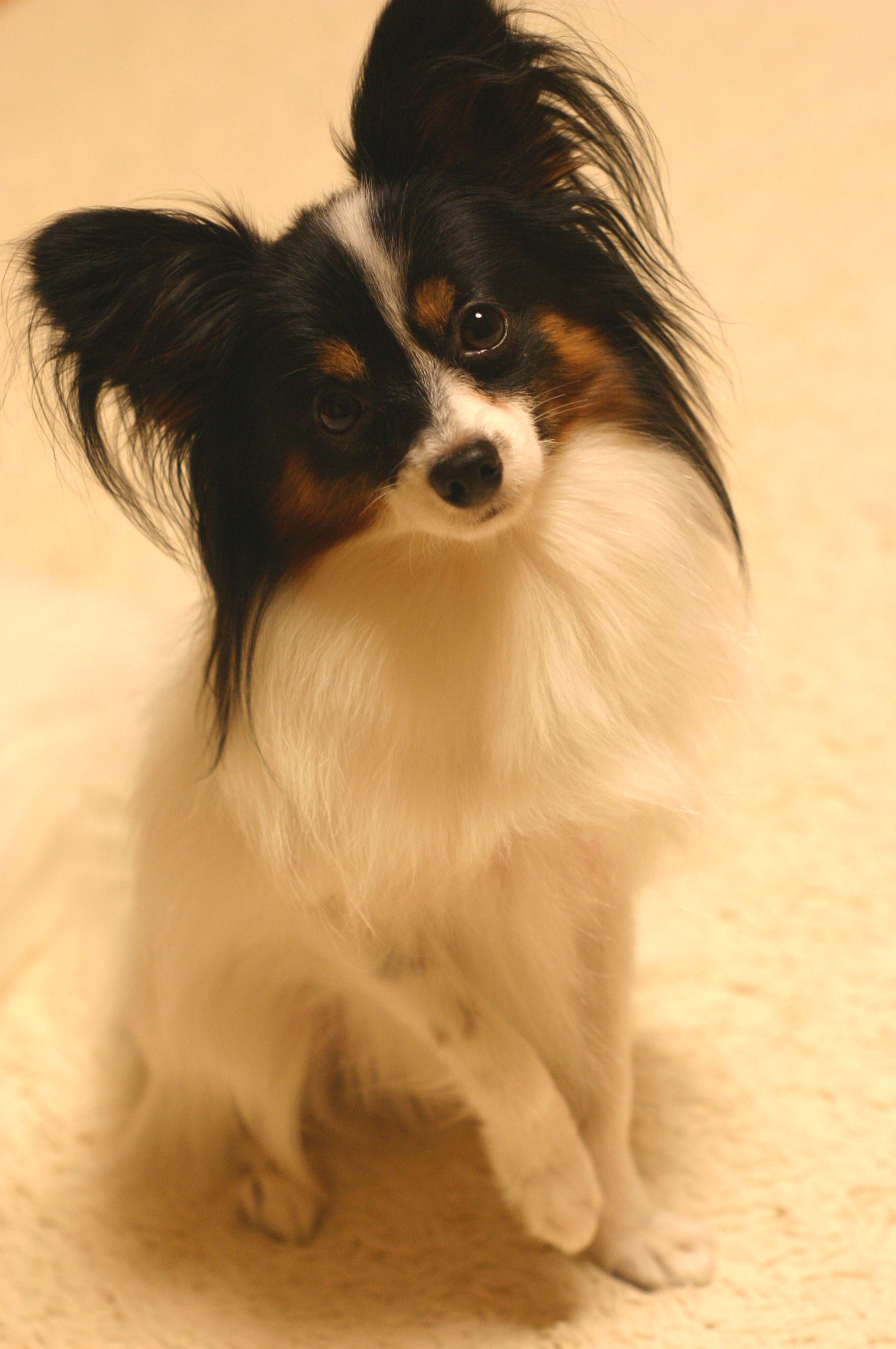 A Papillon dog sitting.